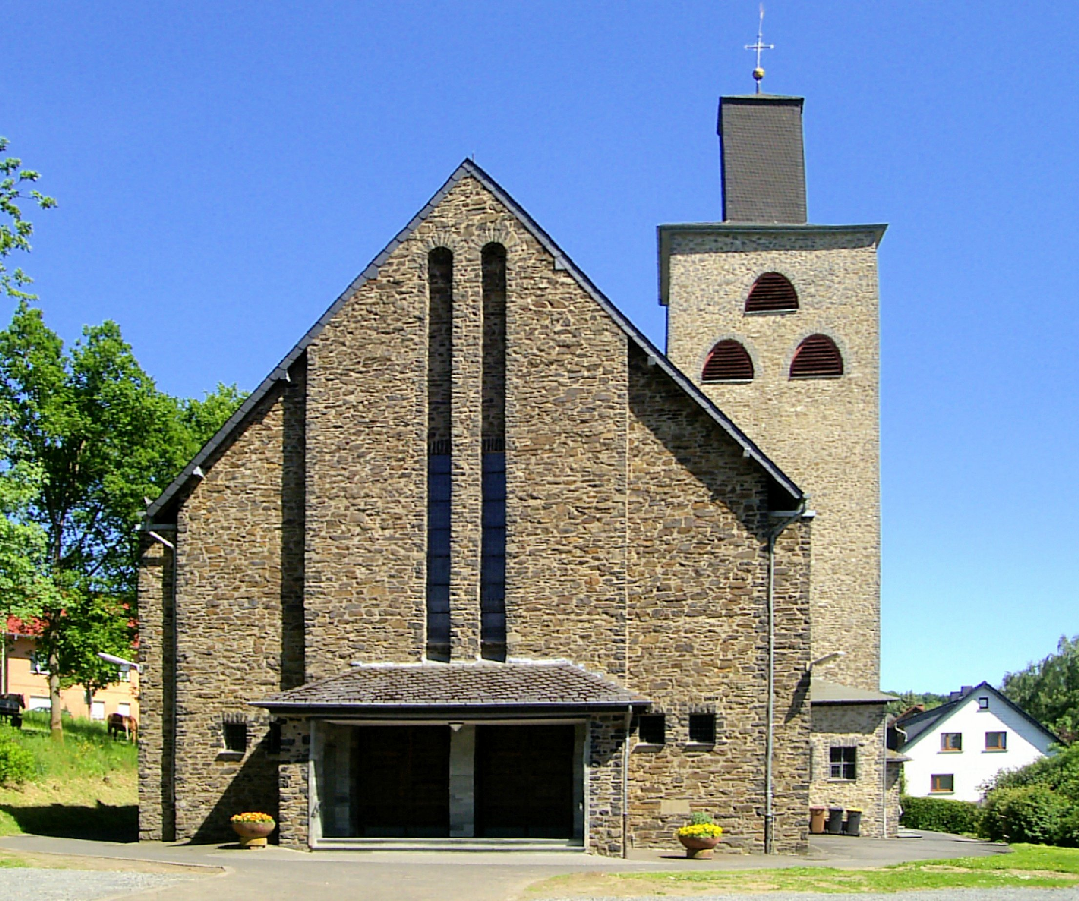 katholische Dreifaltigkeitskirche in Kausen, Landkreis Altenkirchen (Westerwald), Rheinland-Pfalz, Deutschland